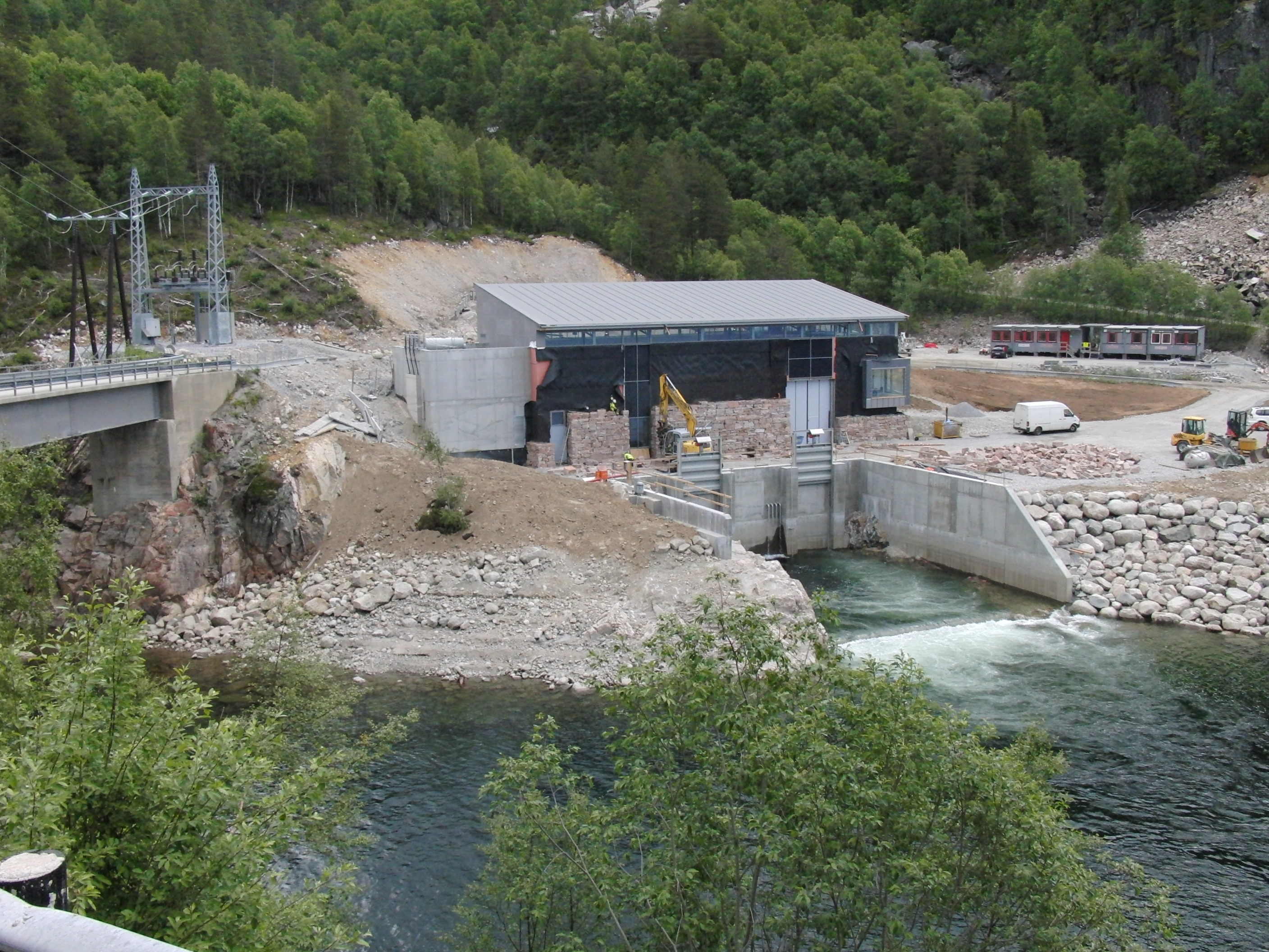 Skarg kraftverk Juni 2014